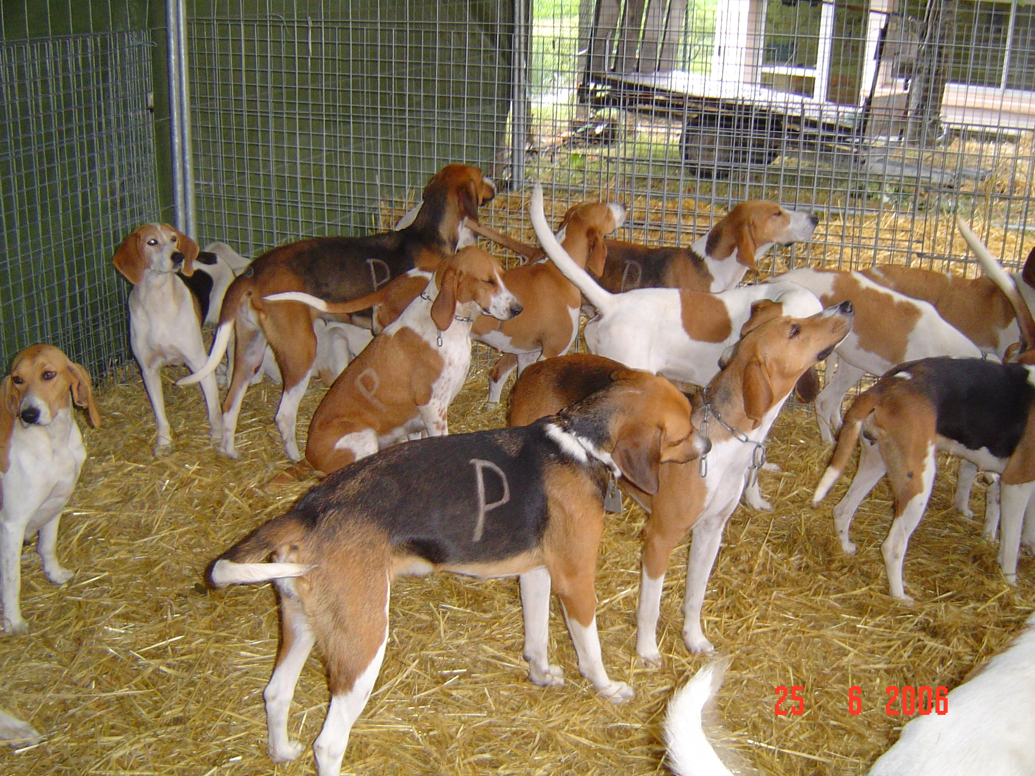 Jauria de Sabuesos Anglo-Franceses de Petit Venerie